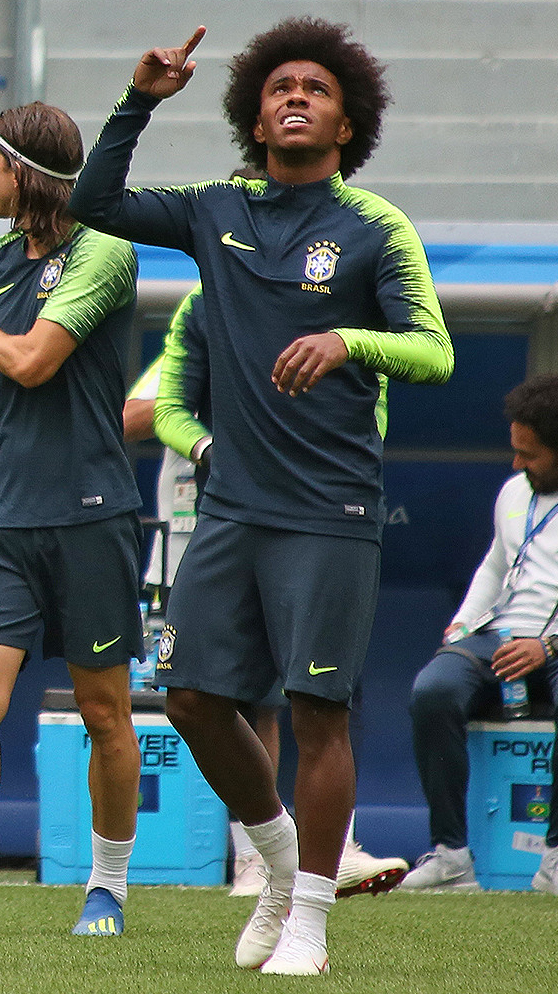 Грядет латиноамериканская битва. Сборные Бразилии и Коста-Рики готовятся к матчу